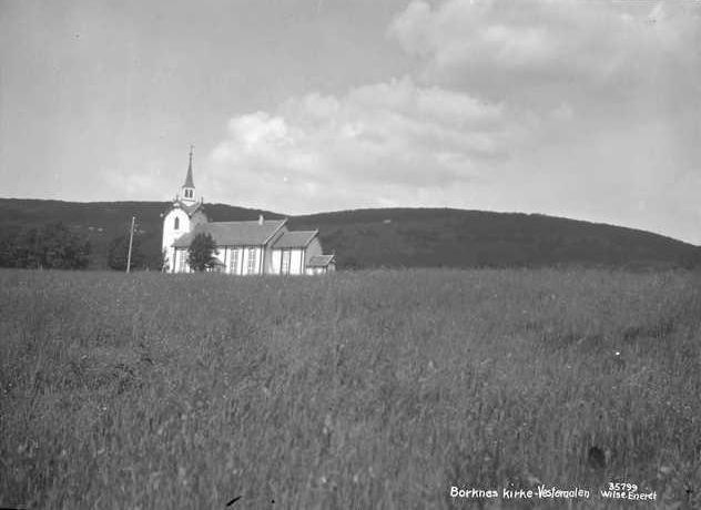 Kvæfjord kyrkje